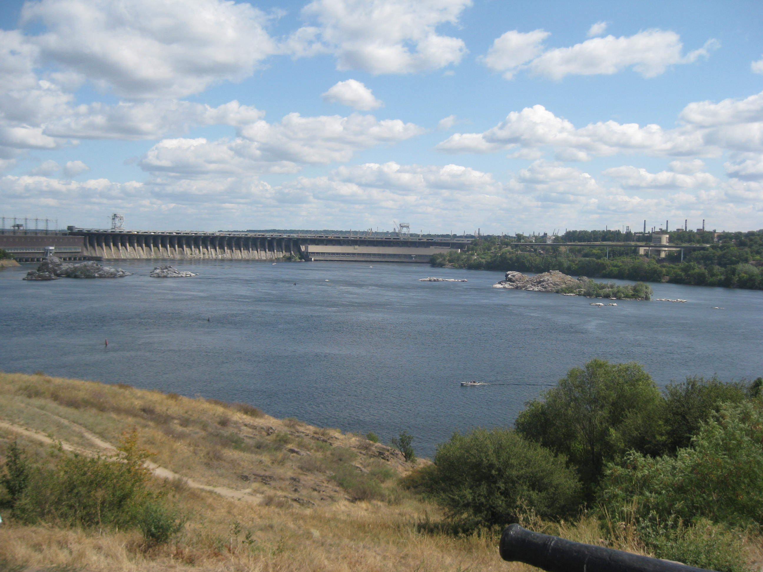 DneproGES In Zaporizhia, Oekraïne